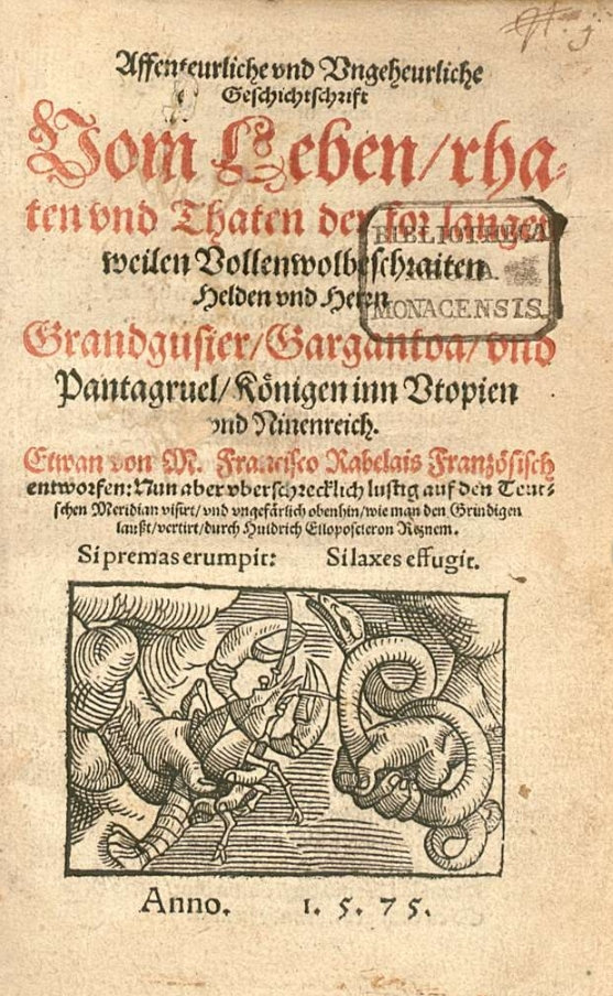 Johann Fischart, Affenteurlich ... (Gargantua) 1575 title page